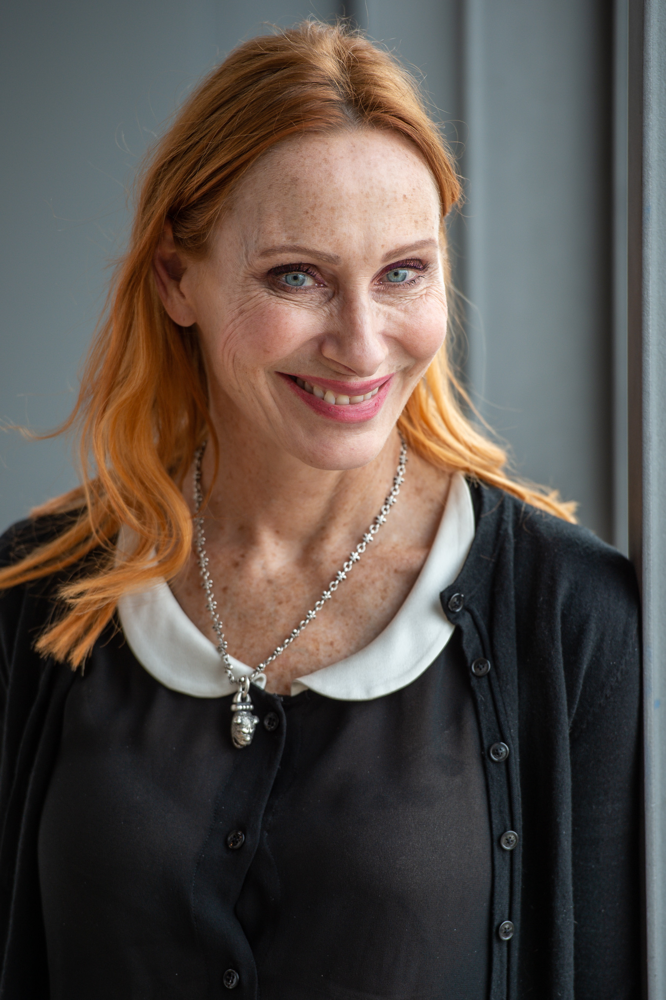 Andrea Sawatzki,BR,Bayerischer Rundfunk,Bayerisches Fernsehen,Filmbrunch 2019,Literaturhaus München